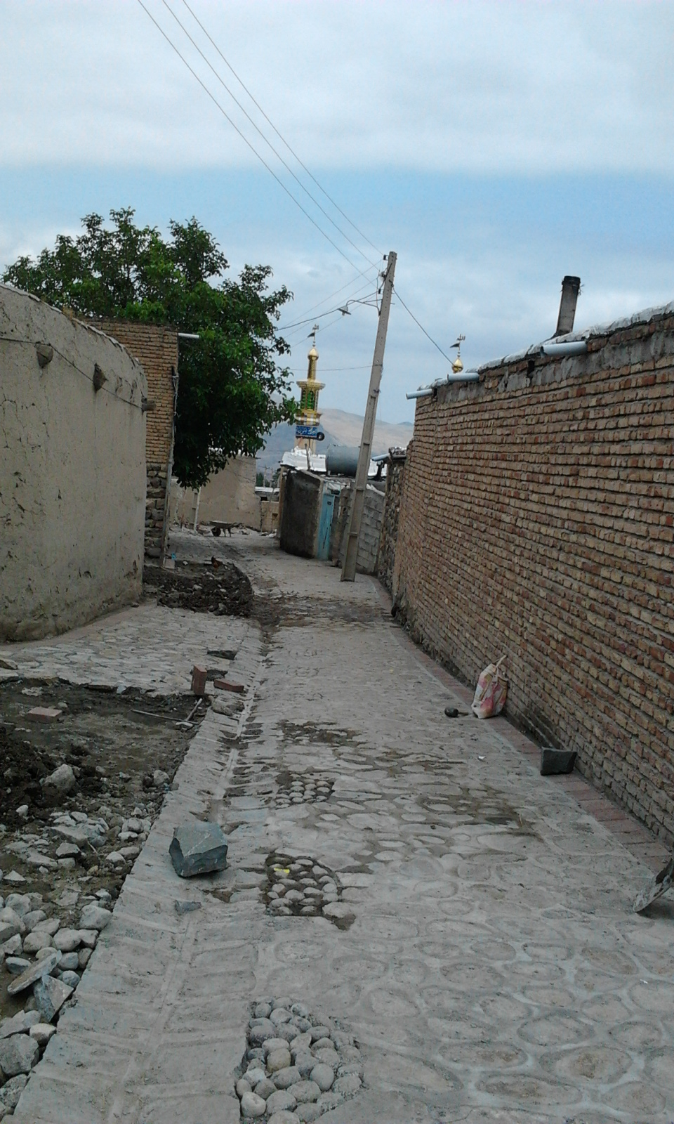 محله مسجد طرفی.